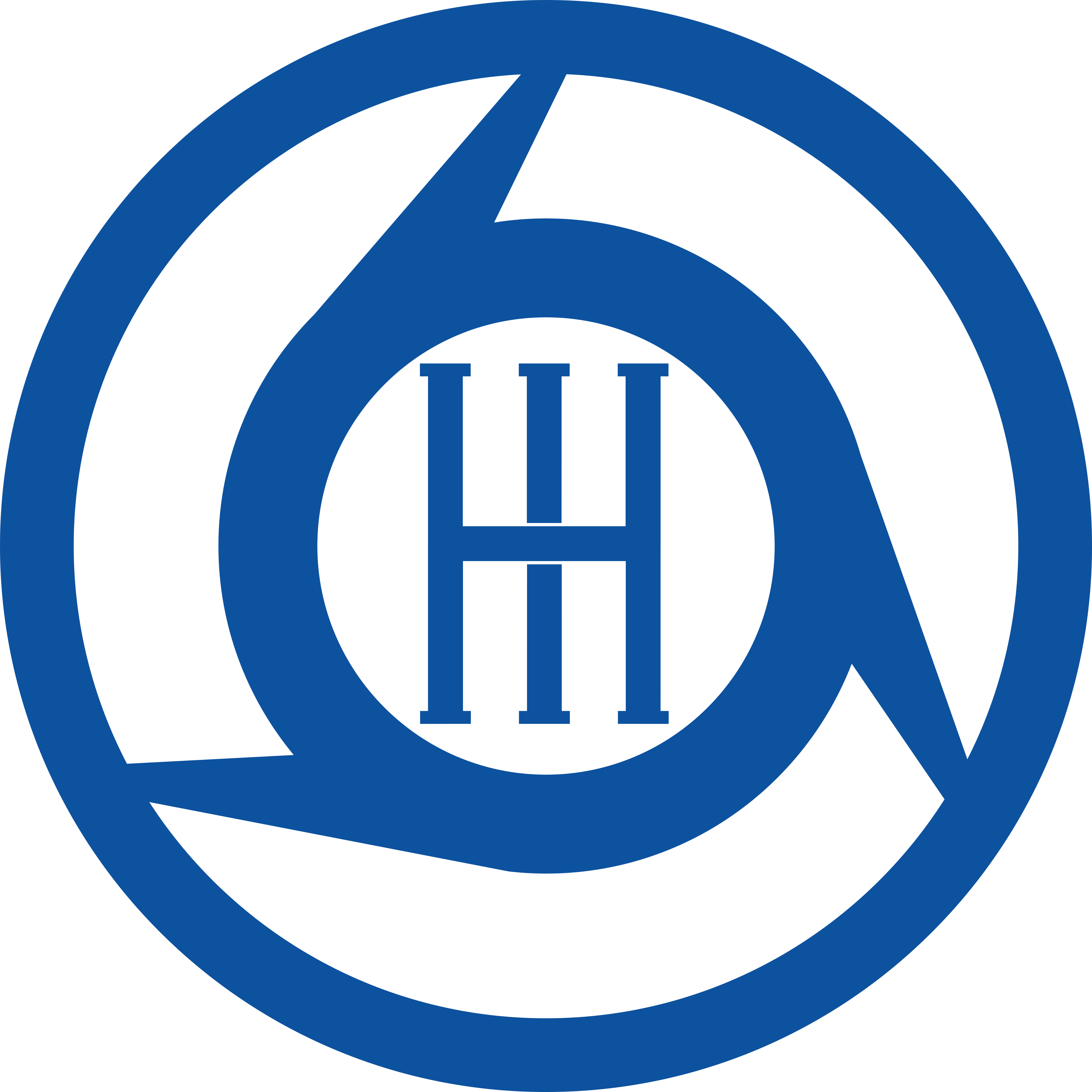 東大阪生駒電鉄社章